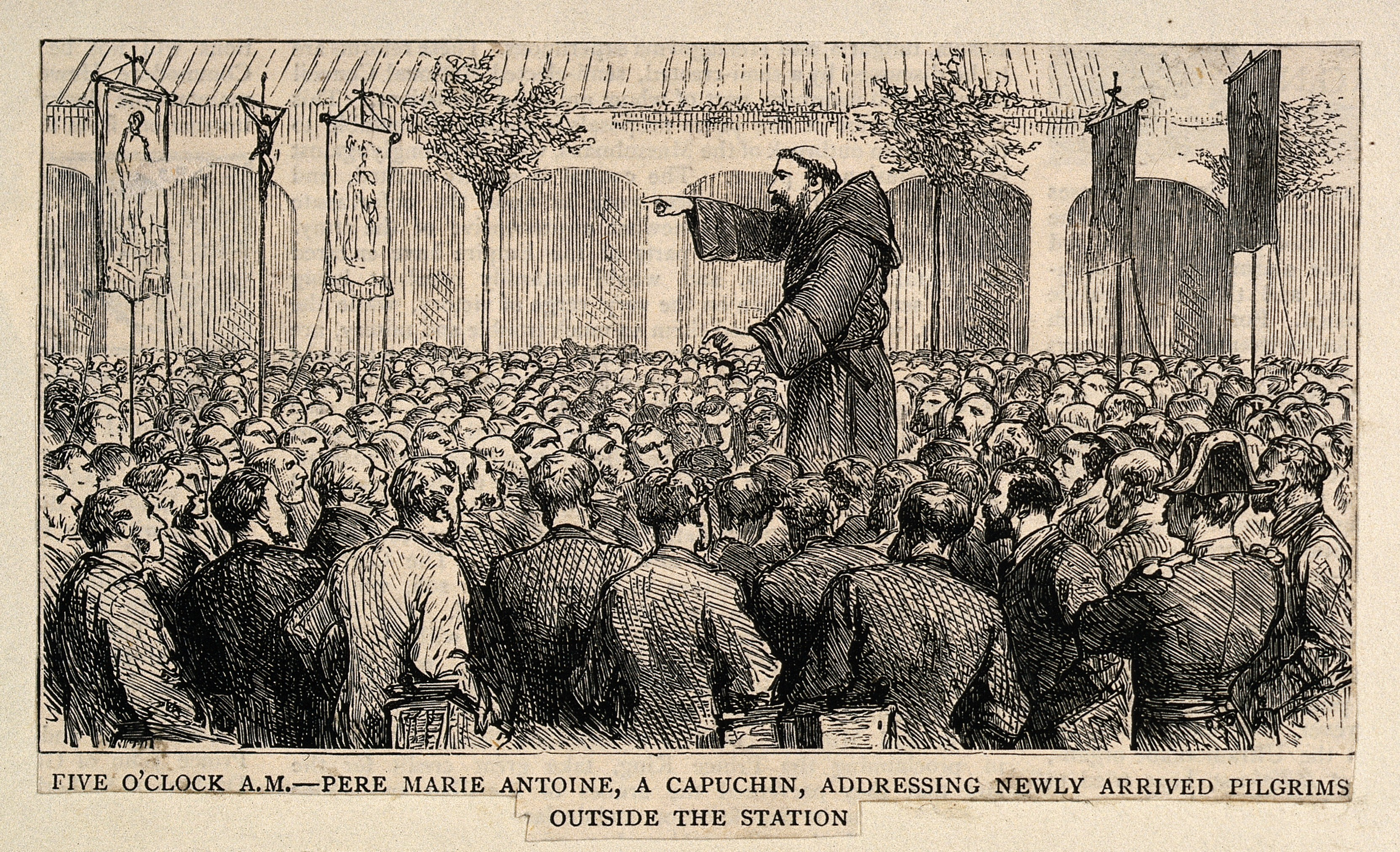 Lourdes, Haute Pyrénées, France: Père Marie Antoine addressing newly arrived pilgrims. Wood engraving. Iconographic Collections Keywords: Pere Marie Antoine